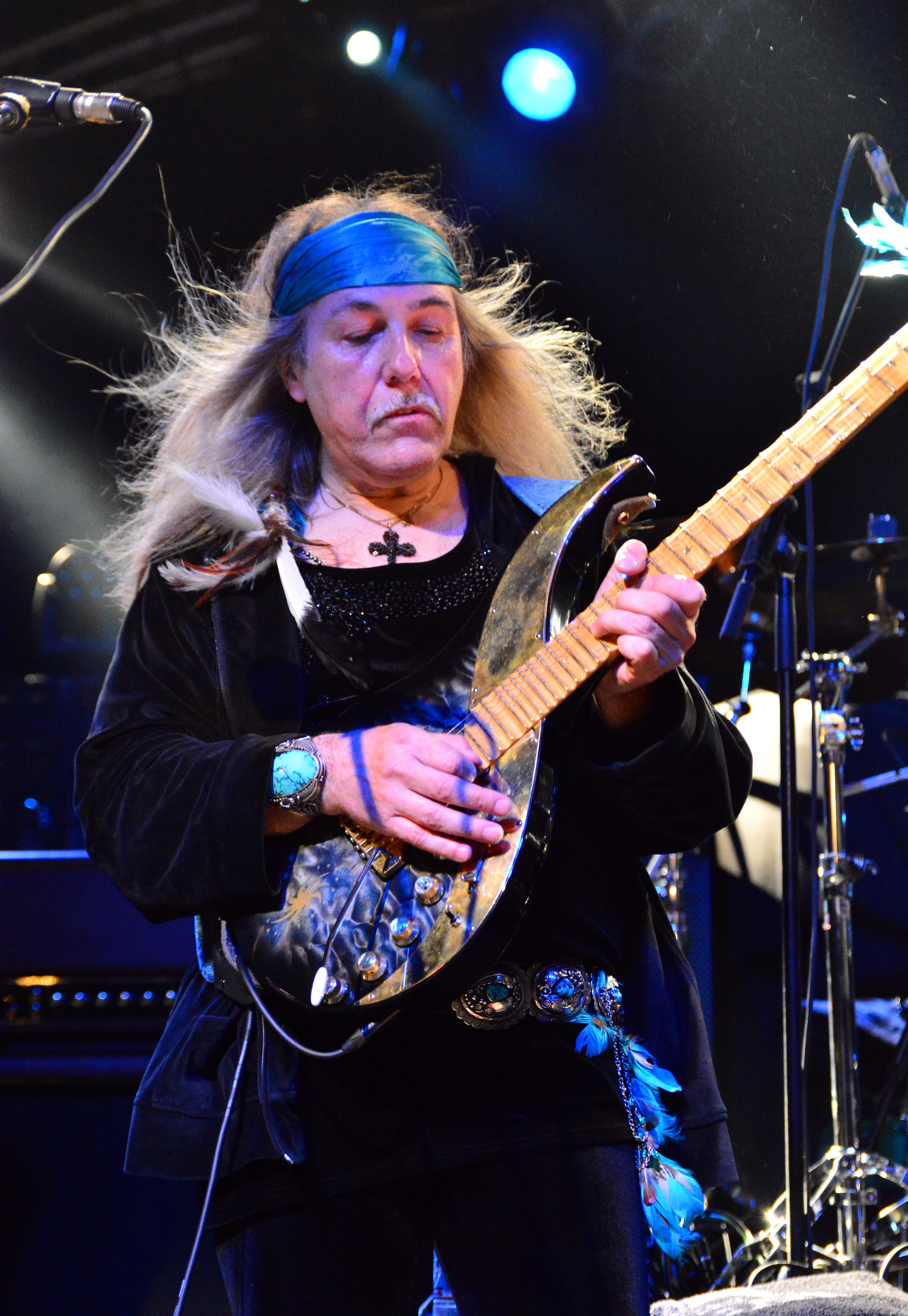 Uli Jon Roth bei den Hamburg Metal Dayz 2015